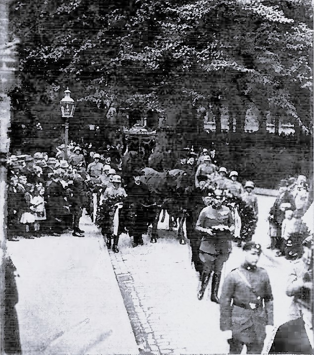 Trauerzug für Generalmajor von Heynitz am Dom.